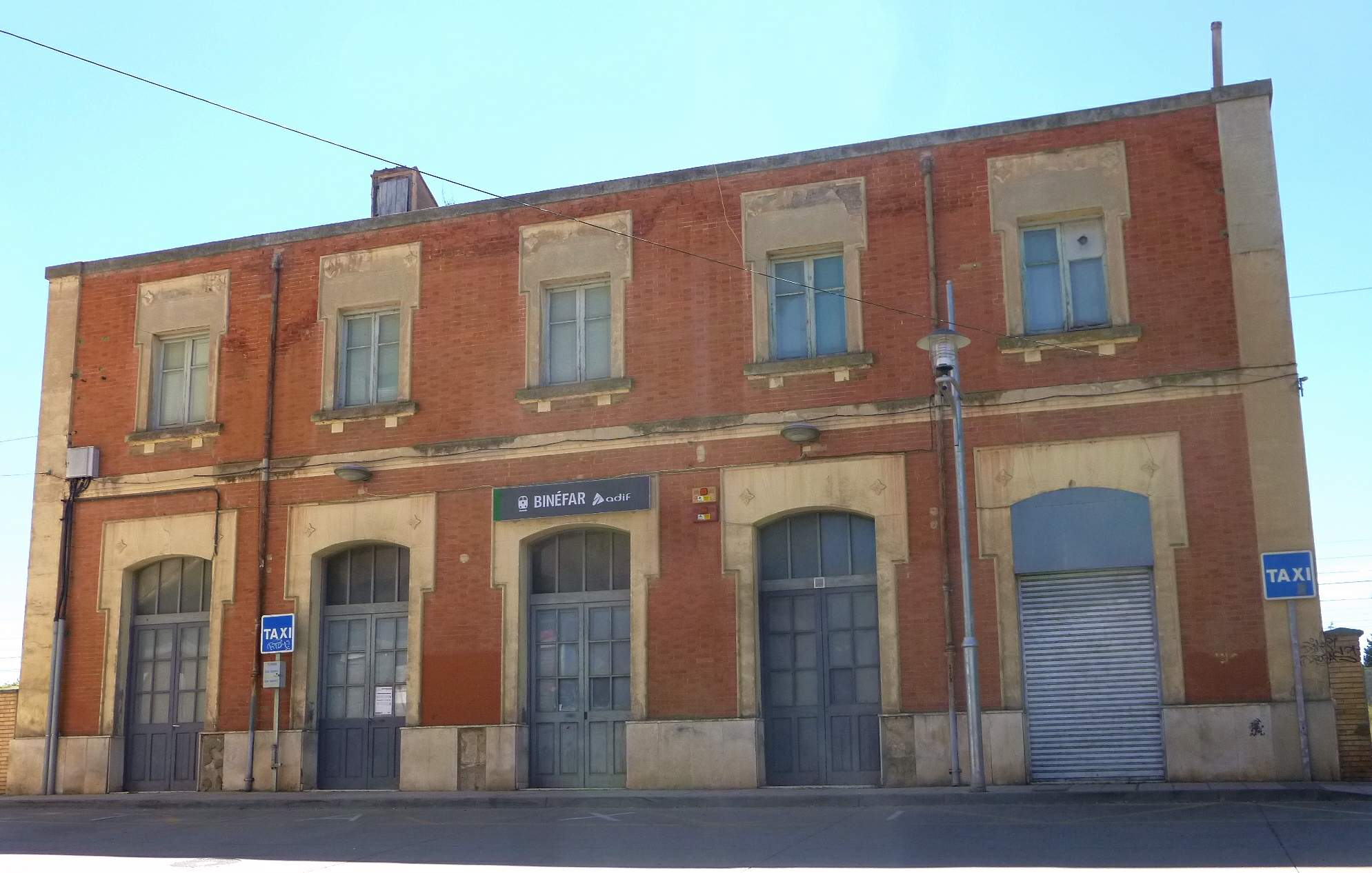 Binéfar - Estación de tren